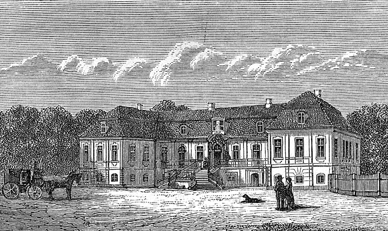 Margård er en gammel sædegård, som nævnes første gang i 1310. Margård ligger i Vigerslev Sogn, Skovby Herred, Søndersø Kommune. Hovedbygningen er opført i 1745 .